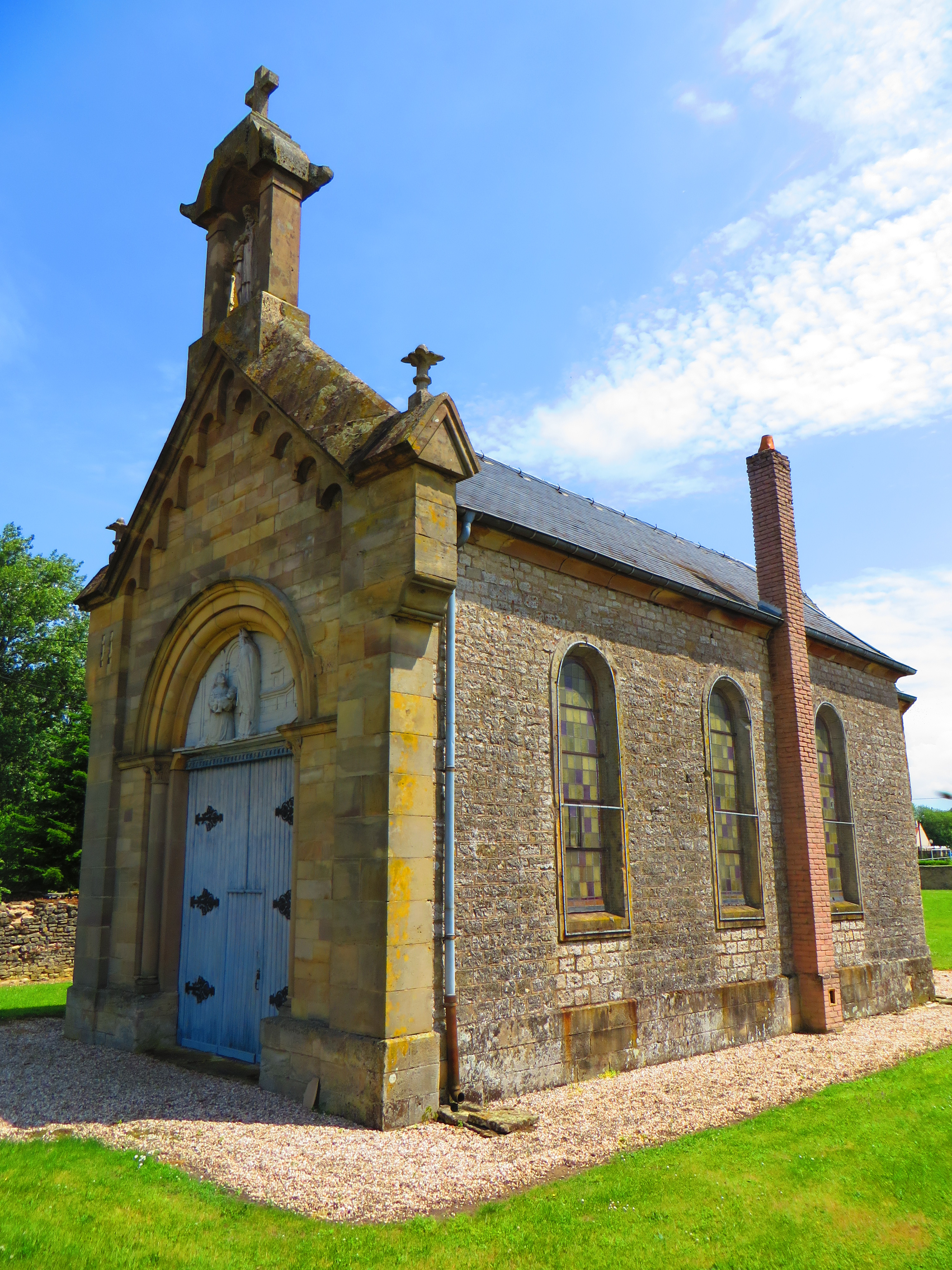 Rechicourt Chateau chapelle